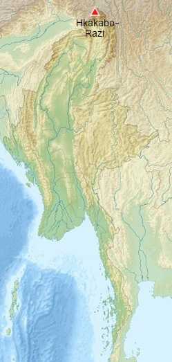 Mapo montranta la situon de la monto Hkakabo-razi en Birmo.